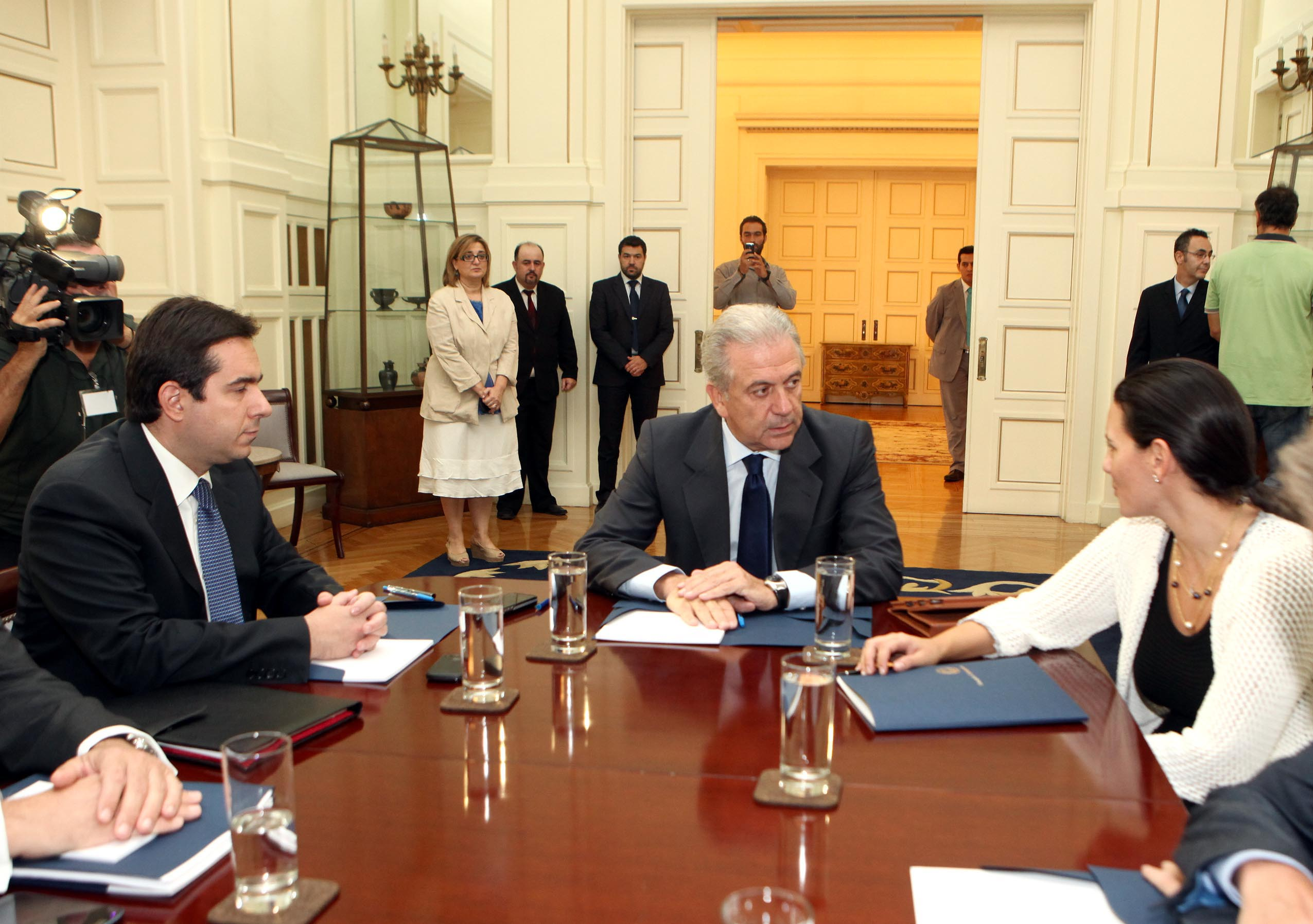 Την Παρασκευή, 5.10. 2012 πραγματοποιήθηκε στο Υπουργείο Εξωτερικών σύσκεψη του Υπουργού Εξωτερικών Δημήτρη Αβραμόπουλου, με την Υπουργό Τουρισμού Όλγα Κεφαλογιάννη και τον Υφυπουργό Ανάπτυξης Νότη Μηταράκη με θέμα τη διεθνή προβολή της Ελλάδας. Πηγή:Π. Στόλης